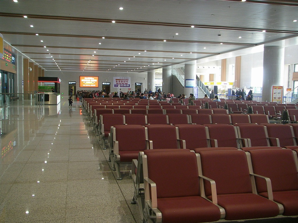 開封北駅待合室